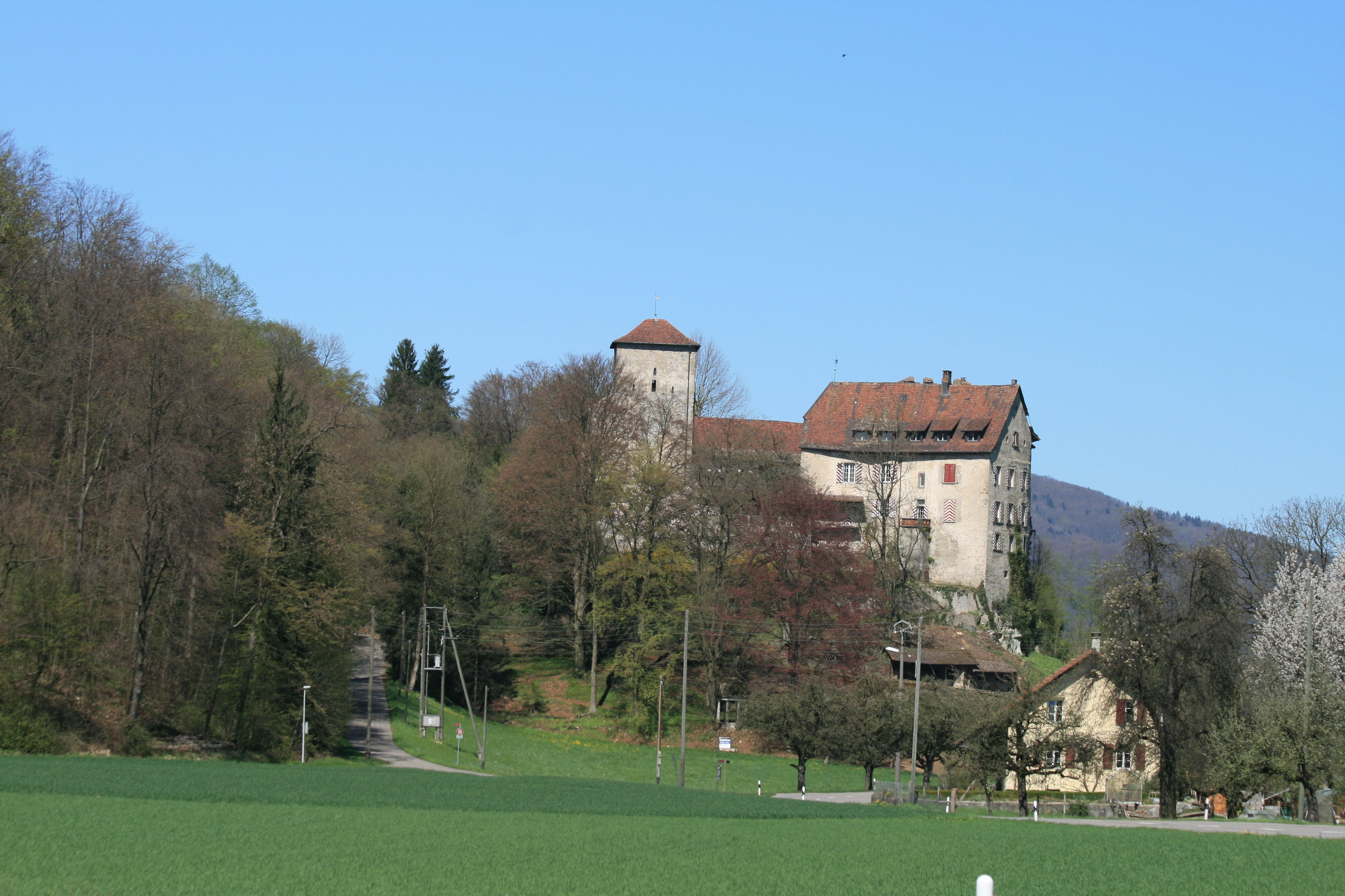 Schloss Wildenstein, Veltheim AG